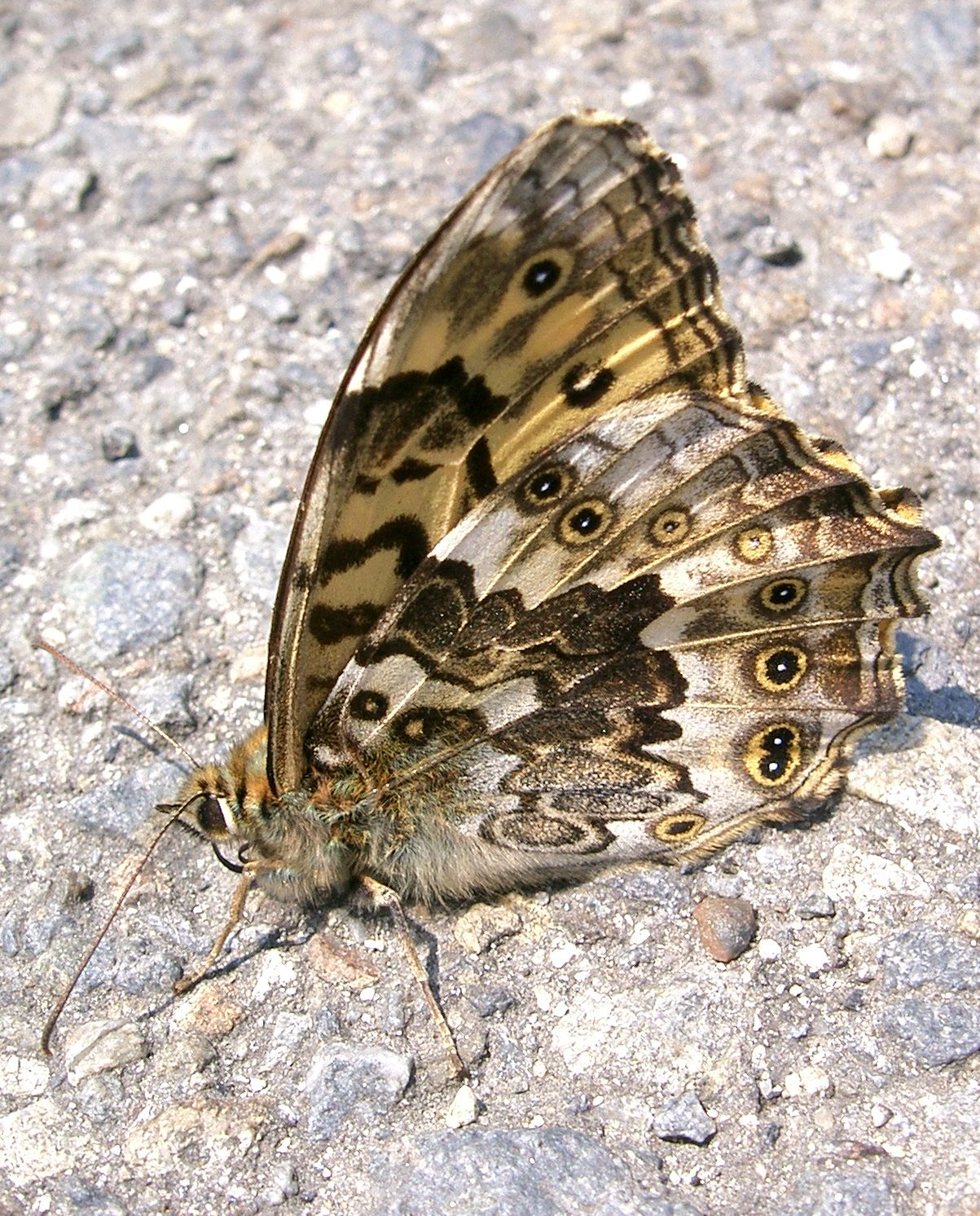 Neope goschkevitschii